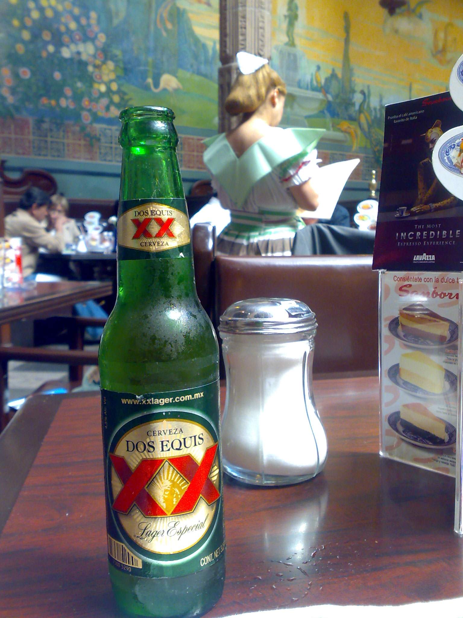 XX lager beer. Picture taken by me.